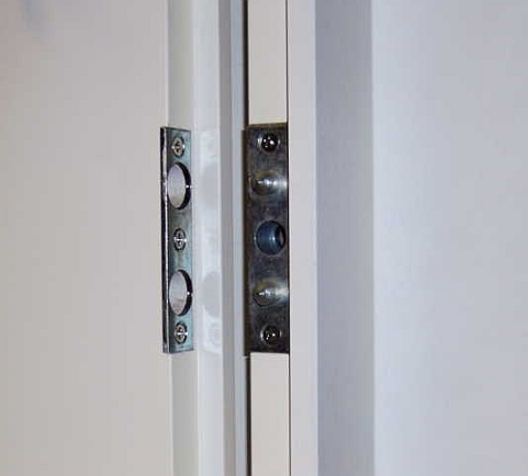 Hinterhaken, Germany.